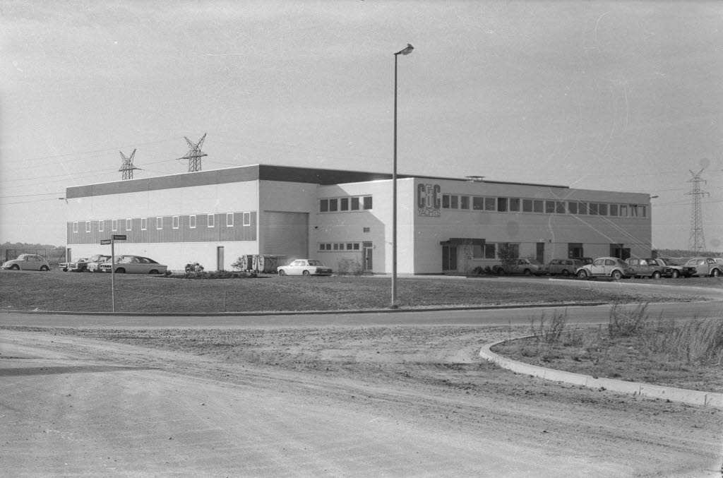 Einweihung der neuen Produktionsstätte für Segelyachten.